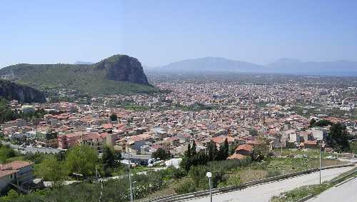 vista di Borgetto fatta da Di Gregorio Paolo foto di pubblico dominio